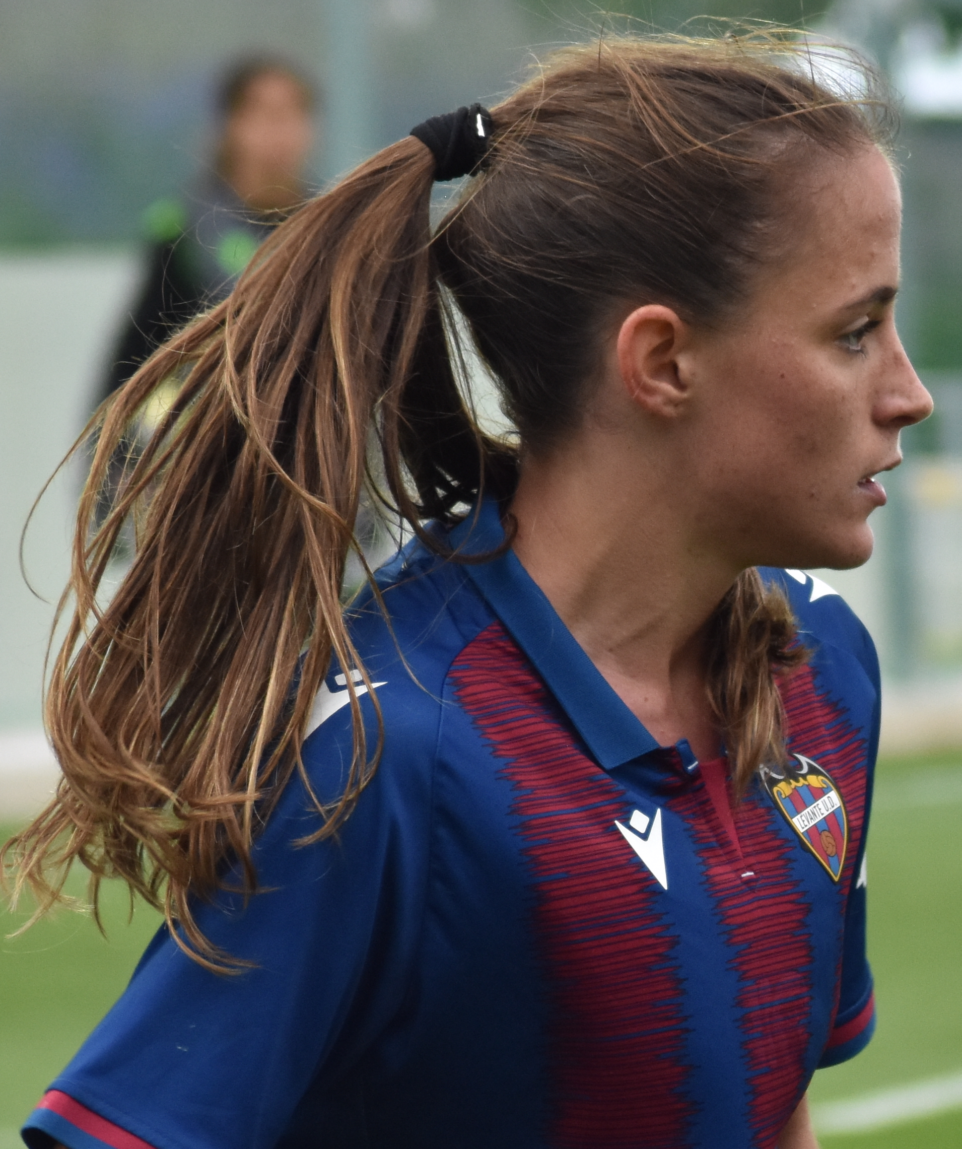 Ona Batlle Pascual durante el partido de la temporada 2019-20 entre el CD Tacón y el Levante UD el 20 de octubre de 2019.